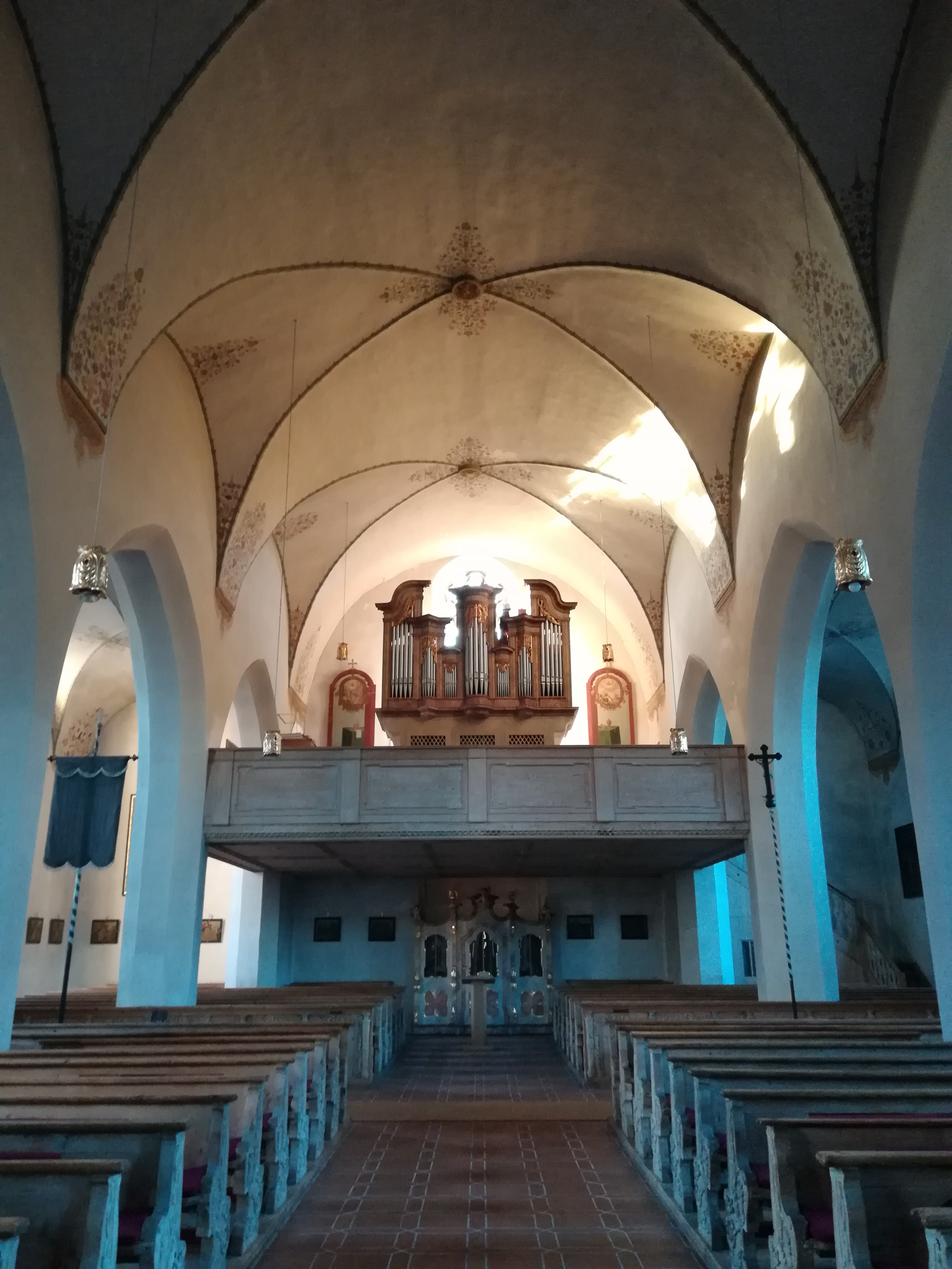 Ansicht der Empore mit Orgel